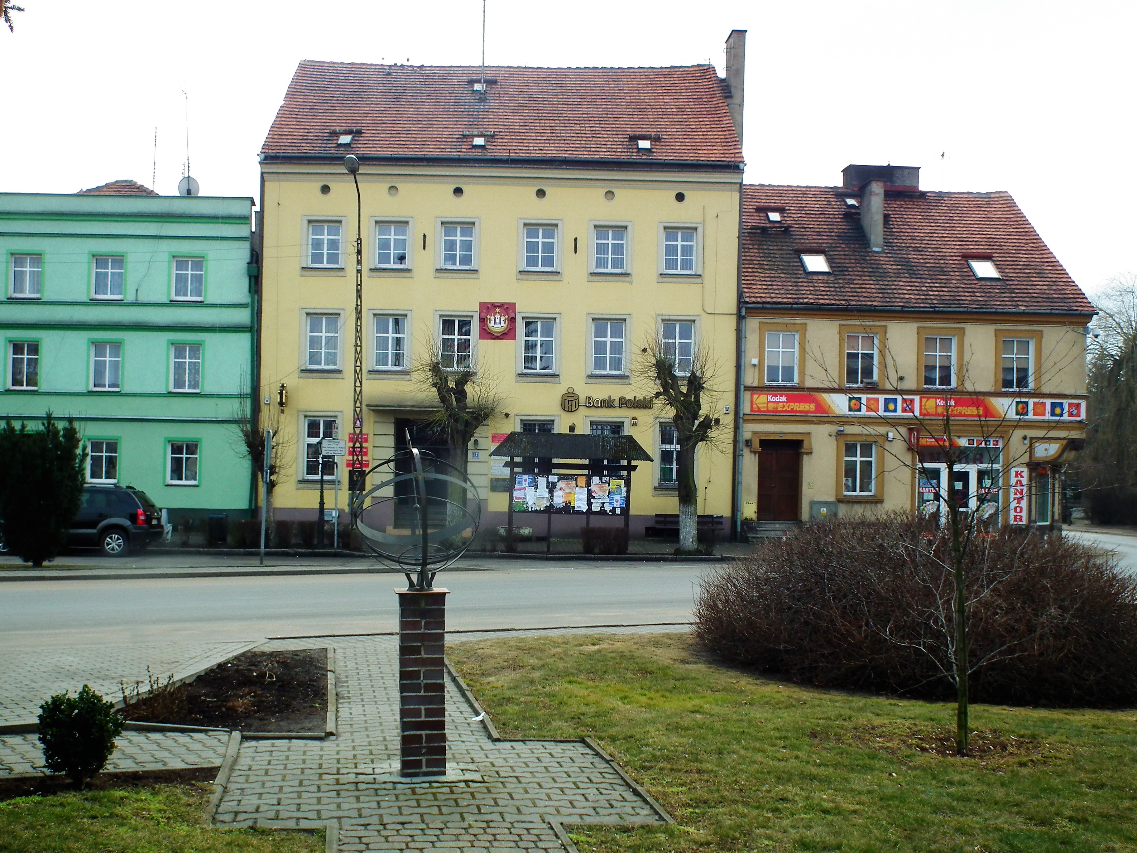 Rynek w Wąsoszy w pow. górowskim.